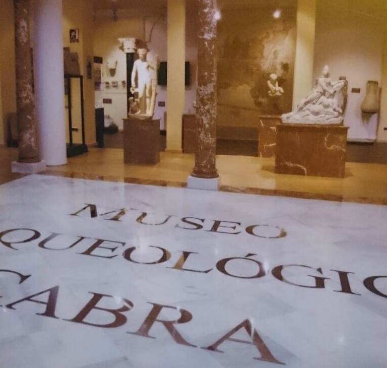 Patio